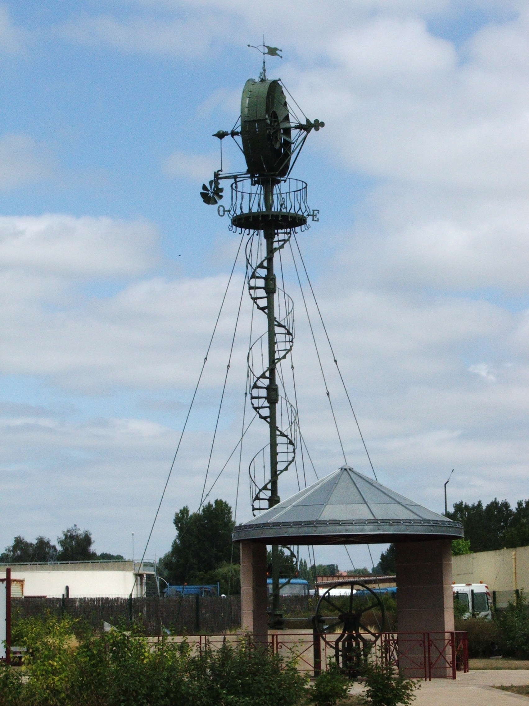 Eolienne Bollée située aux Sablons, a l'entrée de la maison de l'eau.